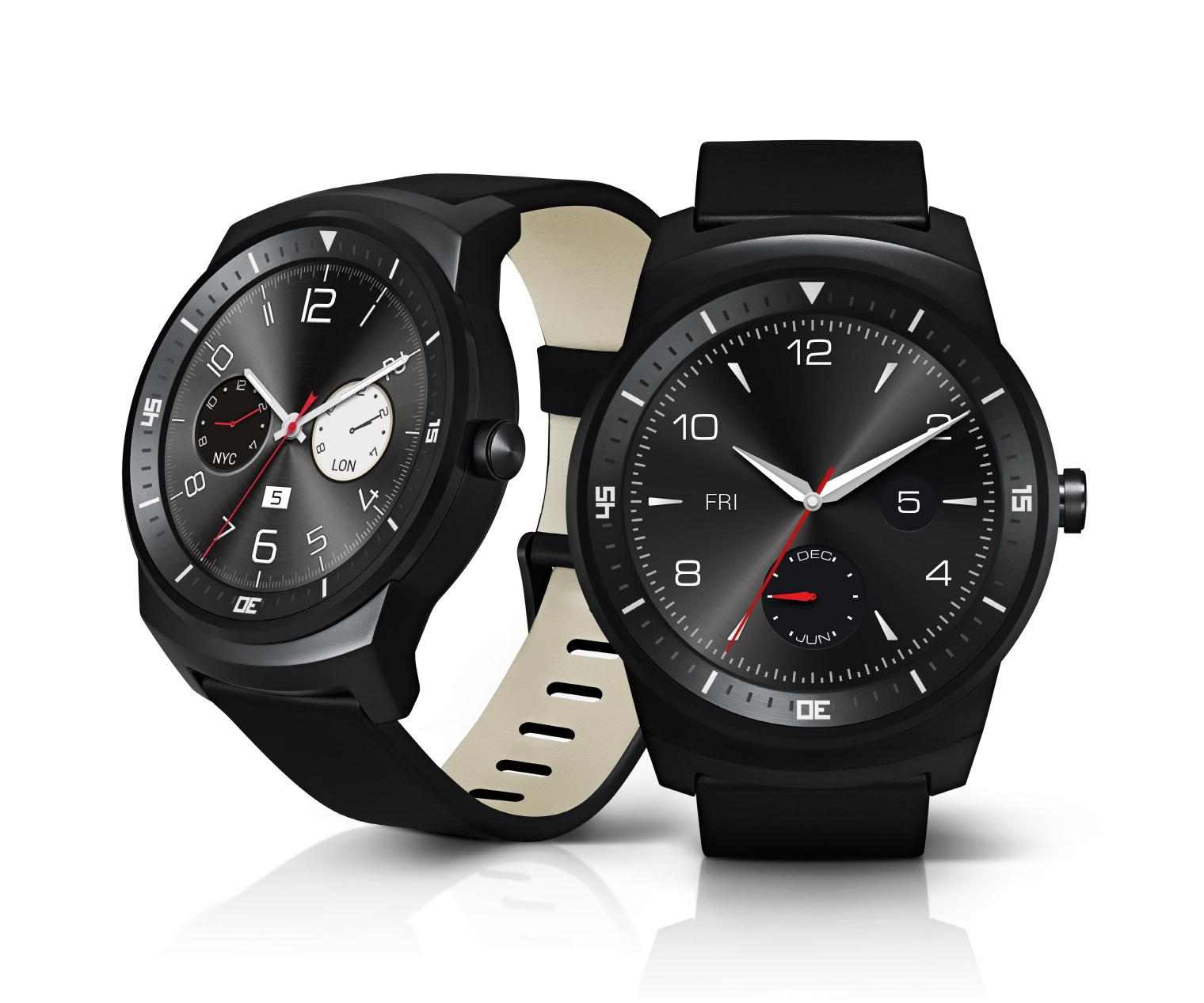 LG전자, ‘LG G워치R’ 해외 시장 공략 개시 ■ 내달부터 유럽, 북미, 아시아, CIS 등 순차 출시 ■ 일부 국가는 구글 플레이 스토어에서 판매 ■ 안드로이드 웨어 새 기능, 다양한 시계화면도 업데이트 예정 ※ Social LG전자 ( 에서 관련 보도자료를 확인하실 수 있습니다.